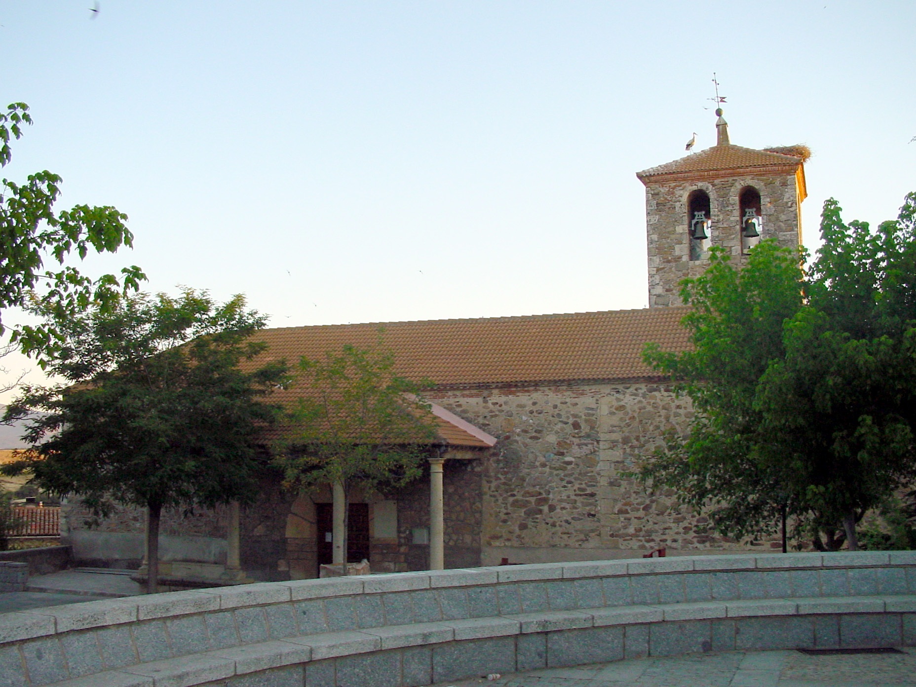 Parroquia de San Miguel Arcángel de Pedrezuela.